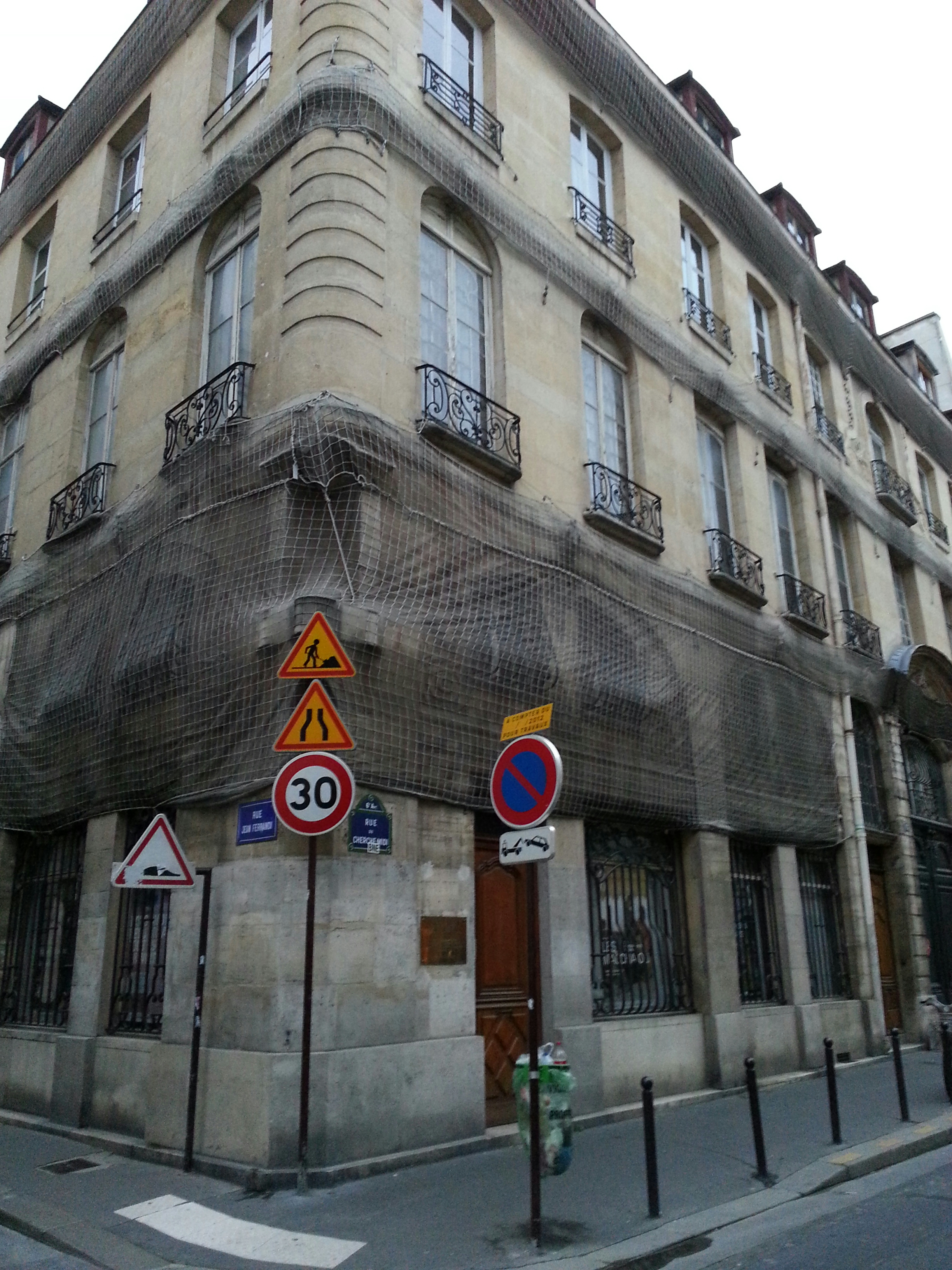 Musée Hébert .